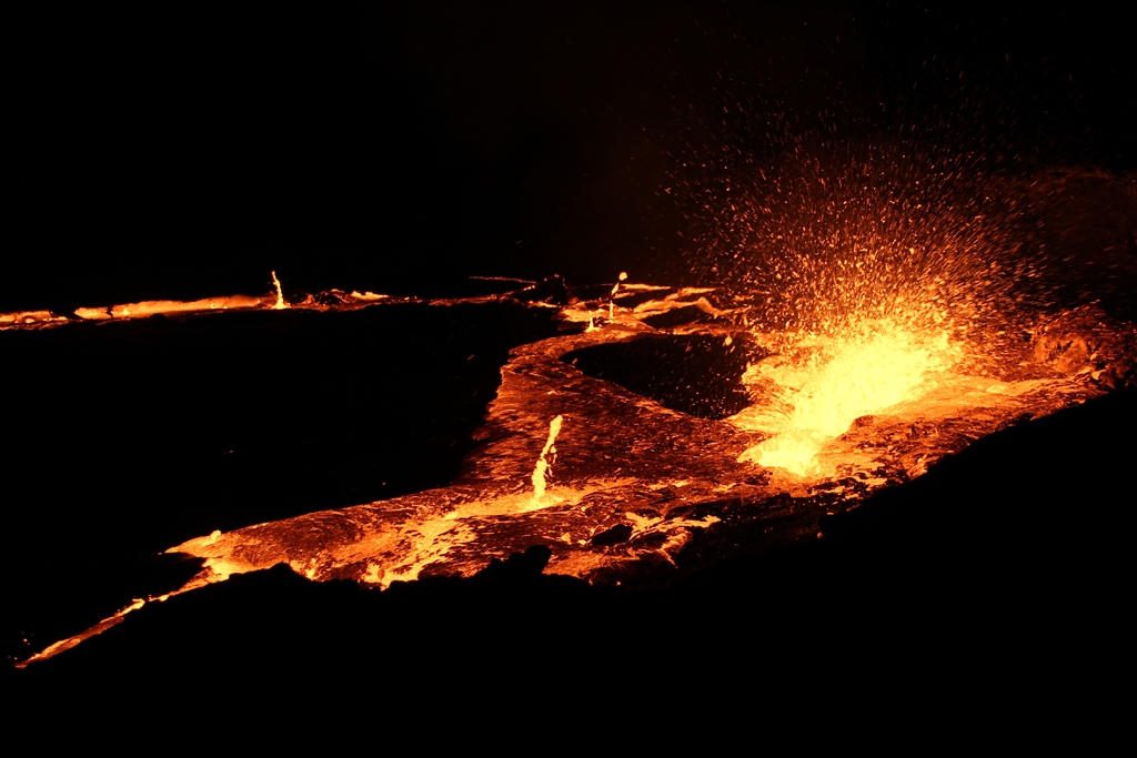 התפרצות געשית בהר געש באתיופיה. מיקום : דנאקיל .